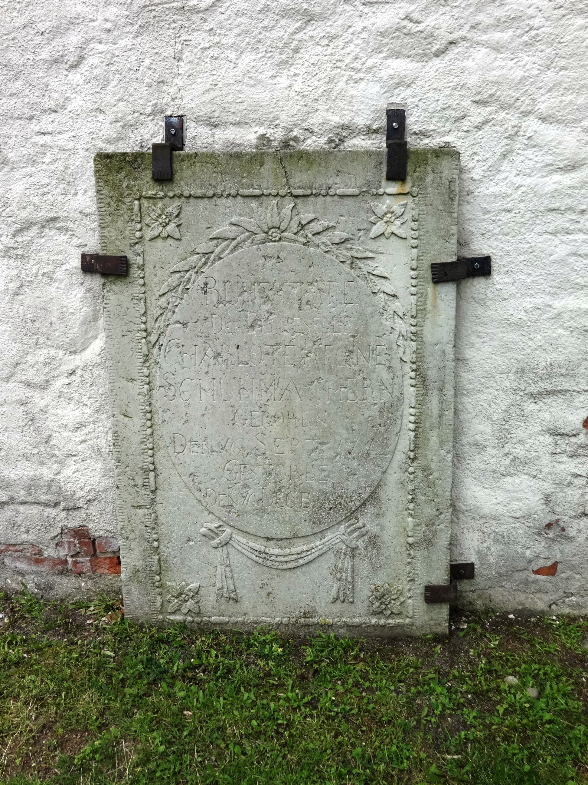 Die Dorfkirche in Klein Bünzow stammt aus dem 13. oder 15. Jahrhundert und befindet sich in der gleichnamigen Gemeinde im Landkreis Vorpommern-Greifswald in Mecklenburg-Vorpommern.